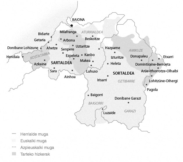 Nafar-lapurtar euskararen mapa (Koldo Zuazo, 2015)